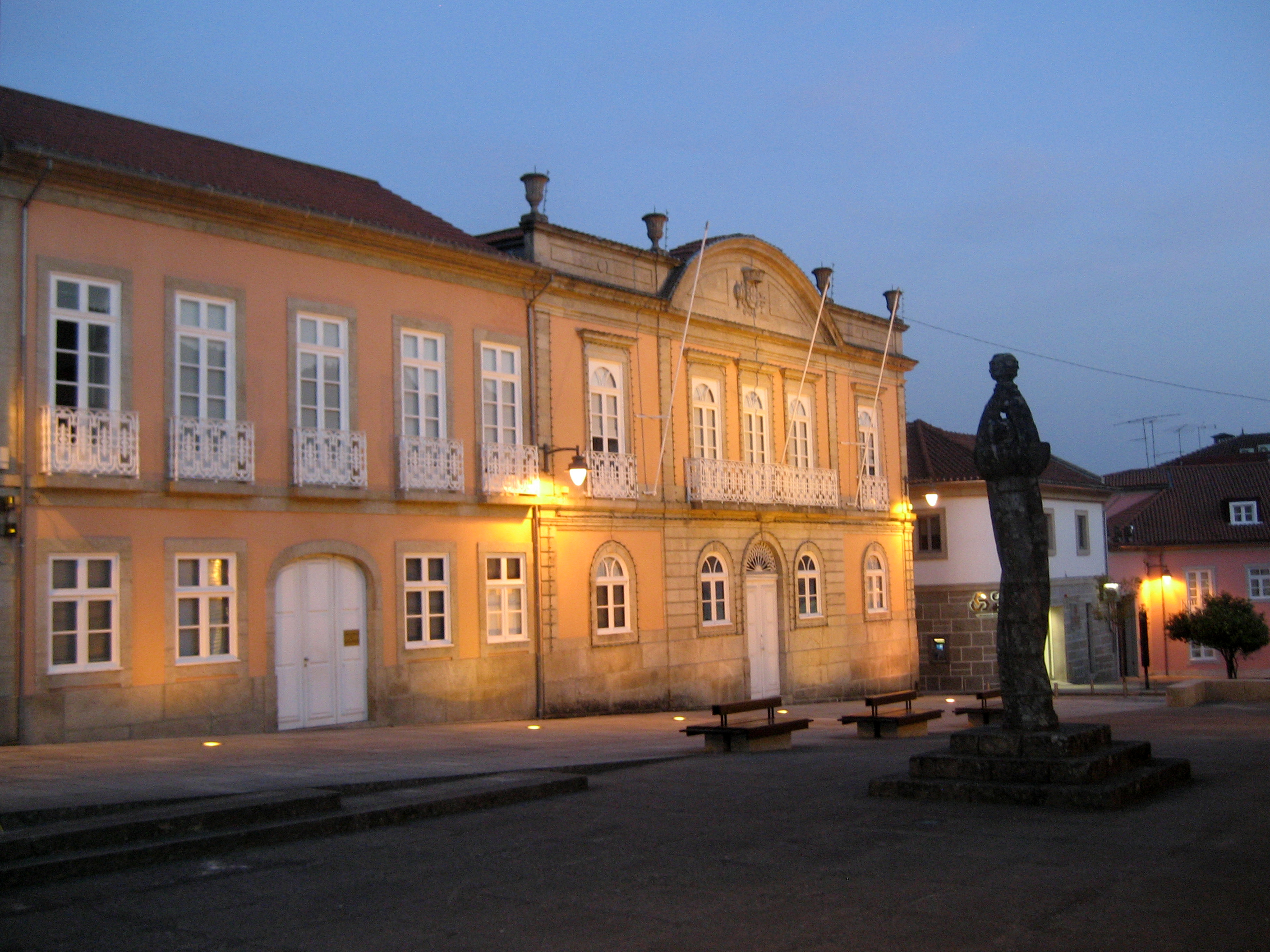 Mairie d'Arcos de Valdevez, Portugal